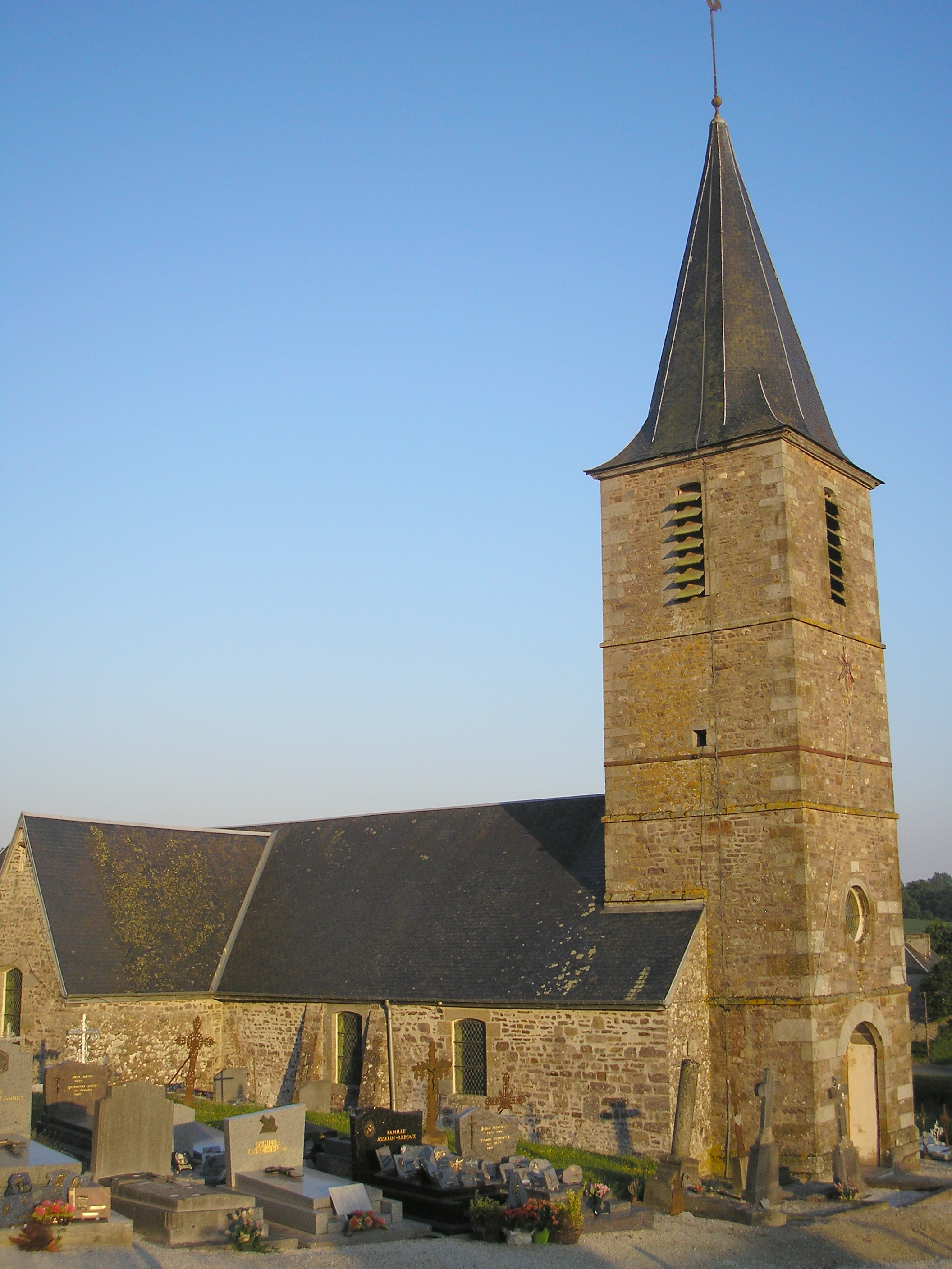 Saint-Martin-Don (Normandie, France). L'église Saint-Martin.